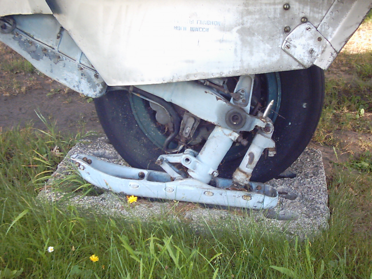 Płoza przy lewym kole myśliwca Su-7BKŁ wspomagająca operowanie z nawierzchni nieutwardzonych A runner on the left wing of a Su-7BKL Fitter-A, which was to assisst in moving on unhardenned surfaces